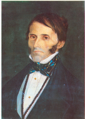 General Hermenegildo Galeana, óleo sobre tela. Imagen tomada del libro: El Ejército y Fuerza Aérea Mexicanos, t. I, México, SDN, 1979, p. 94.